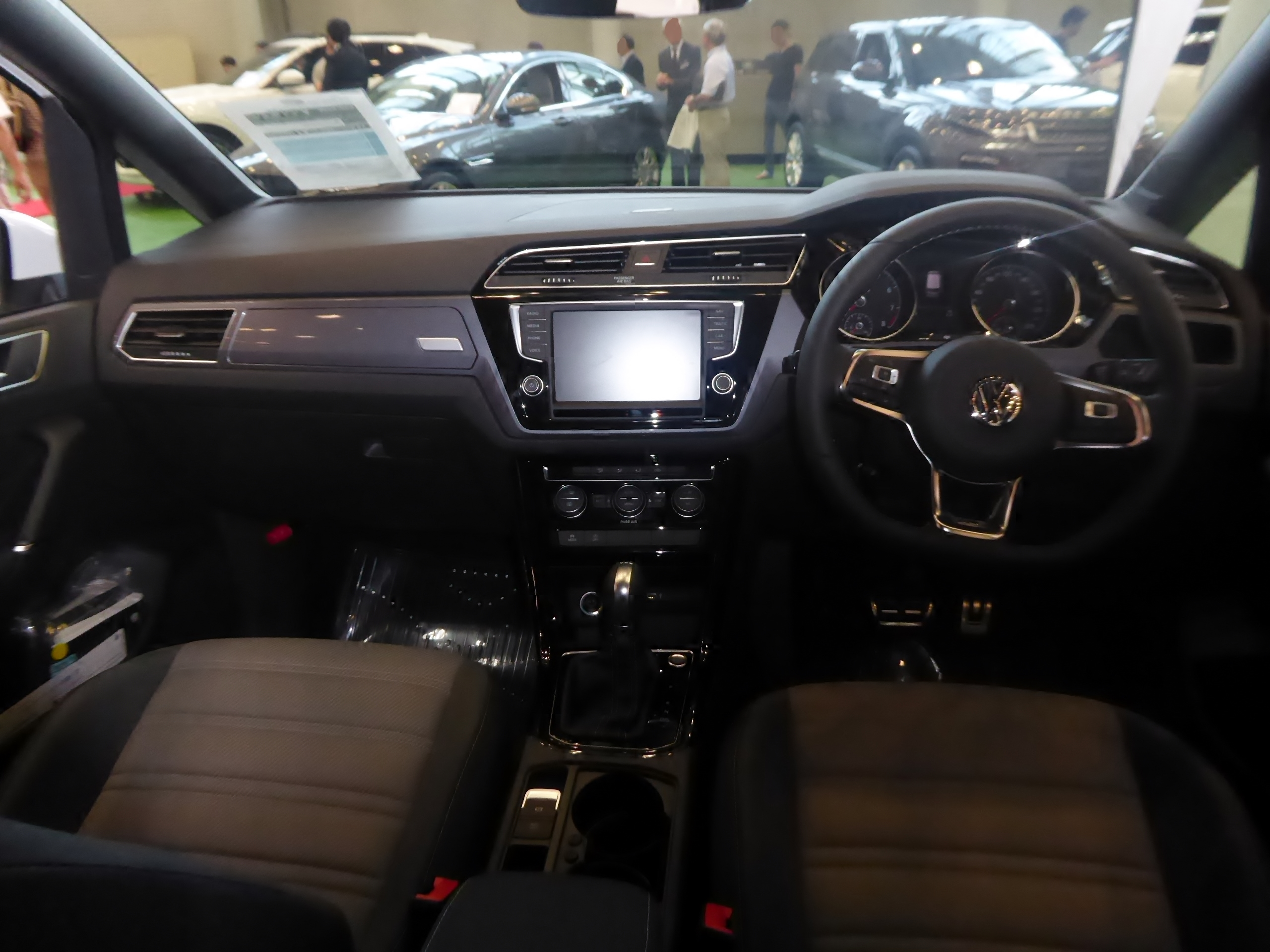 DBA-1TCZD型フォルクスワーゲン・ゴルフトゥーランTSI R-Lineのインテリアを撮影。